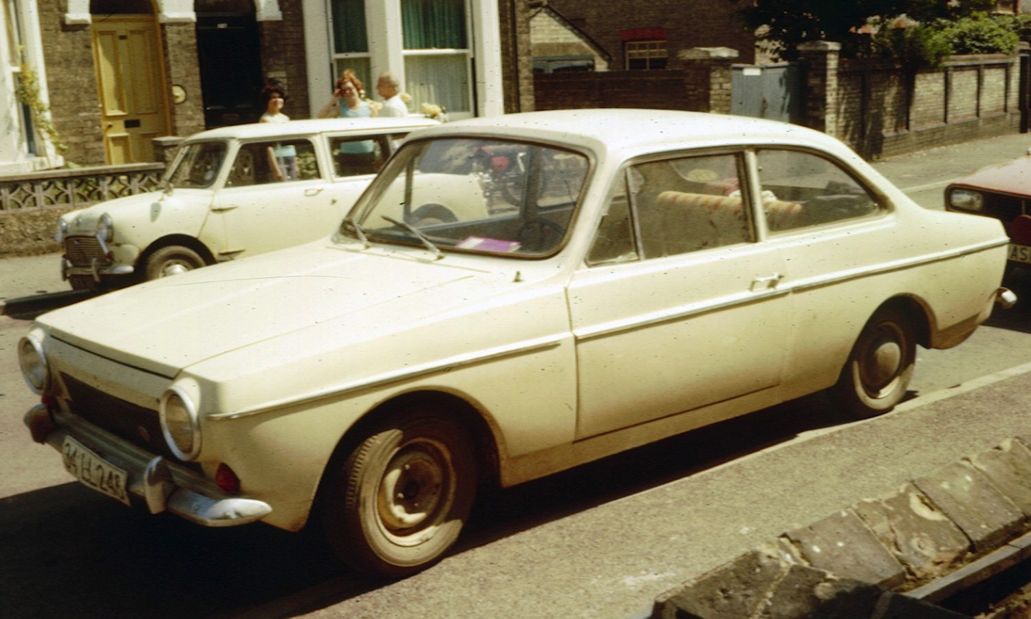 Anadol A1